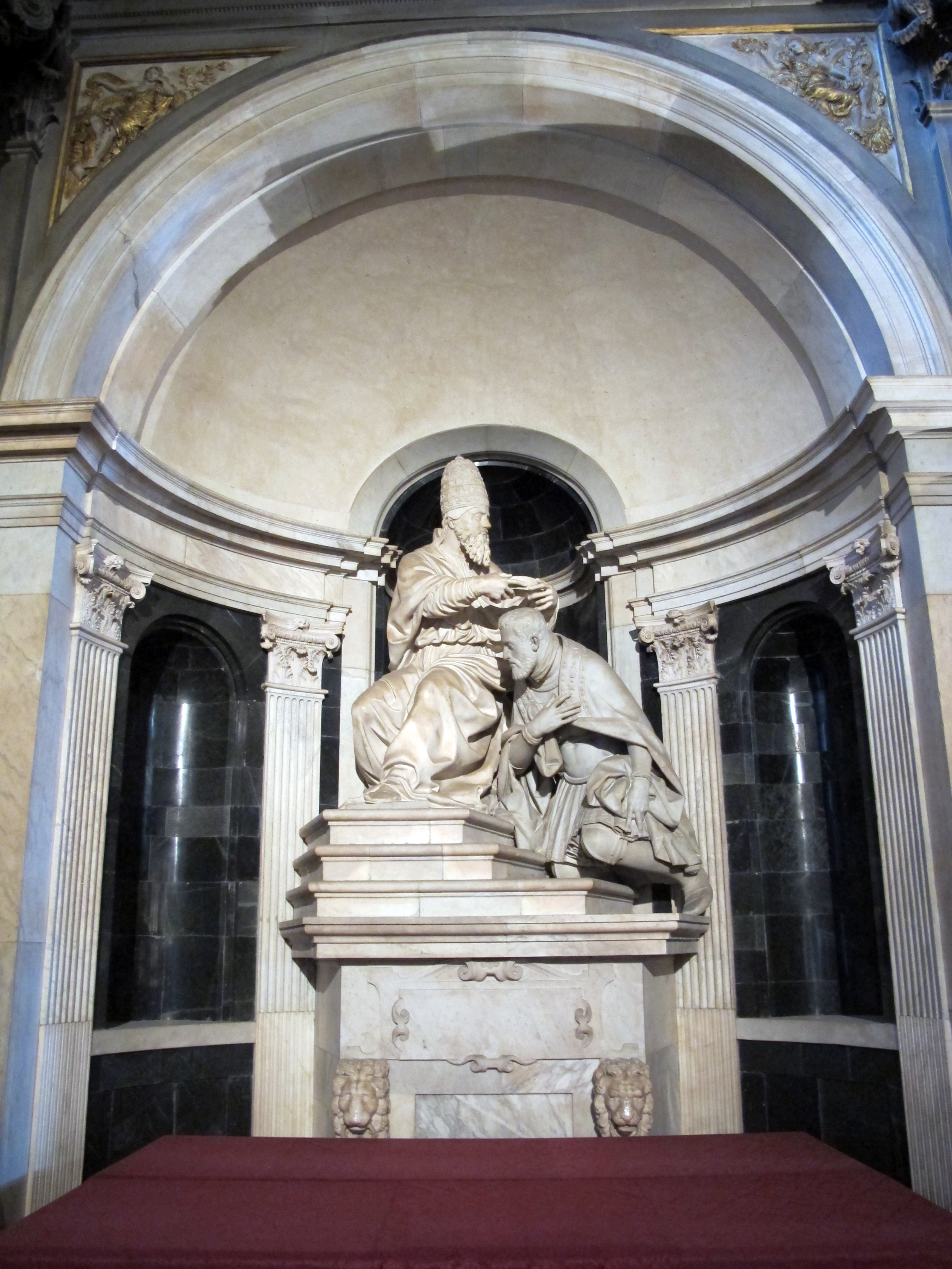 Clemente VII che incorona Carlo V; opera scultorea di Baccio Bandinelli (il papa) e Giovan Battista Caccini (l'imperatore); Firenze, Palazzo Vecchio (Palazzo della Signoria), Salone de' Cinquecento, Tribuna dell'Udienza, parete destra.